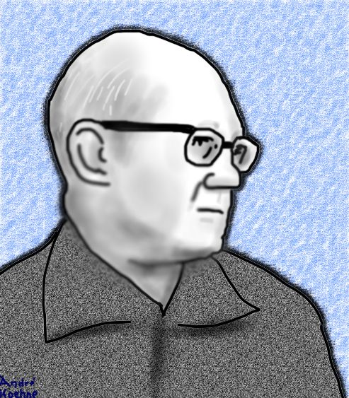 Carlos Drummond de Andrade